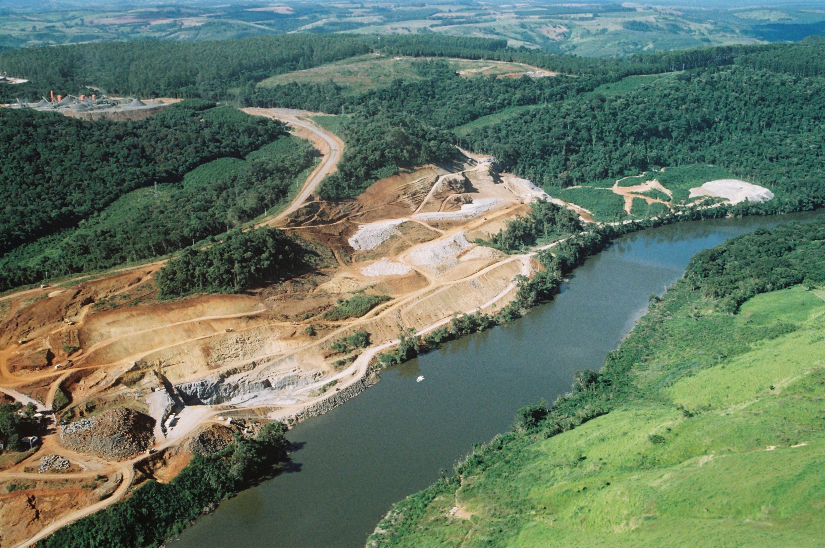 Futura barragem Usina Mauá (Eletrosul/Copel)